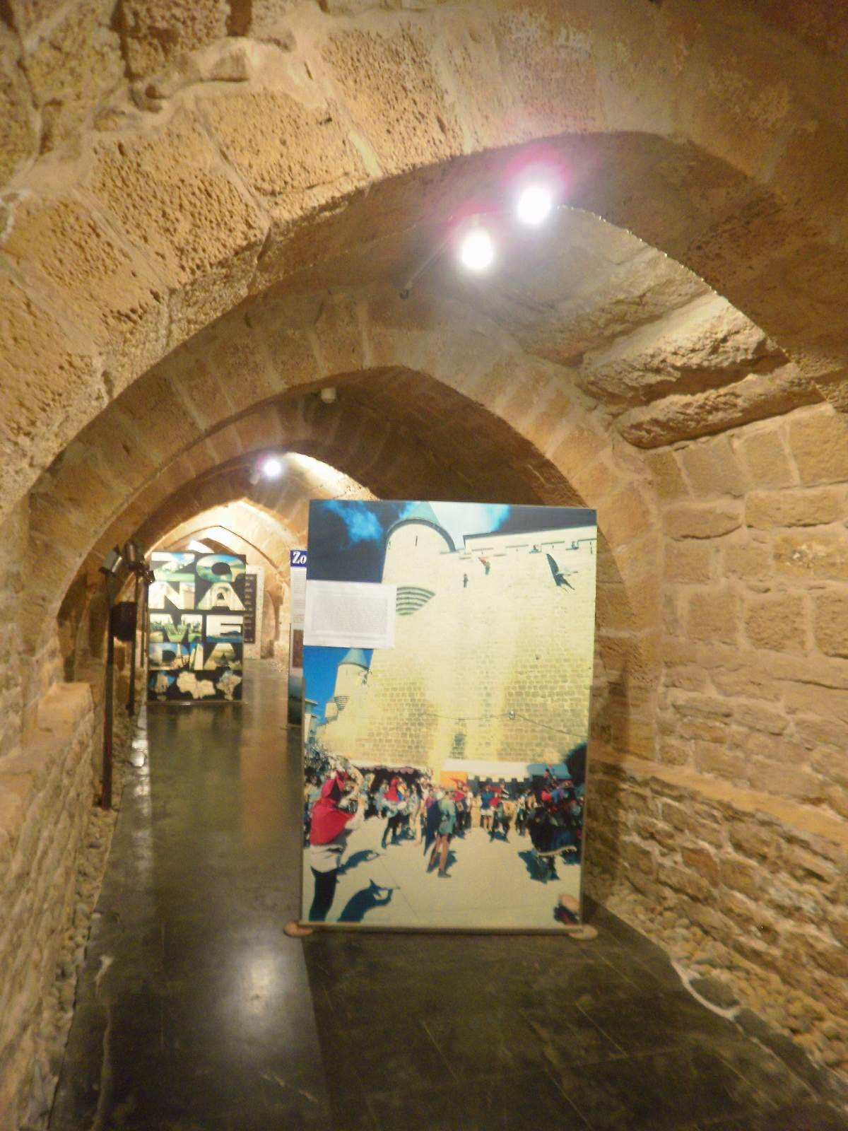 Galerias subterráneas de Olite (Navarra)